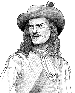 Dessin de Louis de Buade, comte de Frontenac et de Palluau (1622-1698).